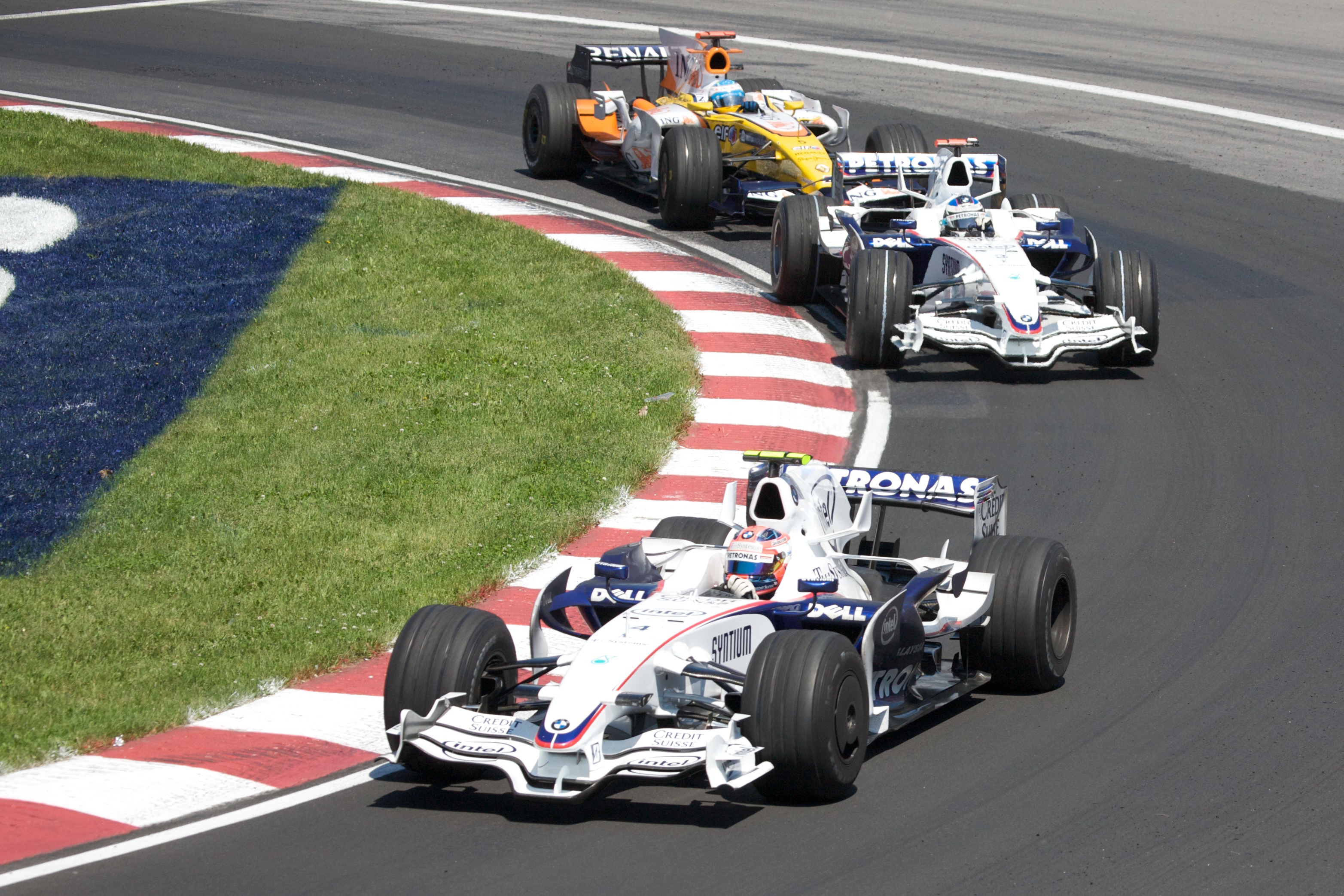 Kubica, Heidfeld, Alonso - Canada GP 2008